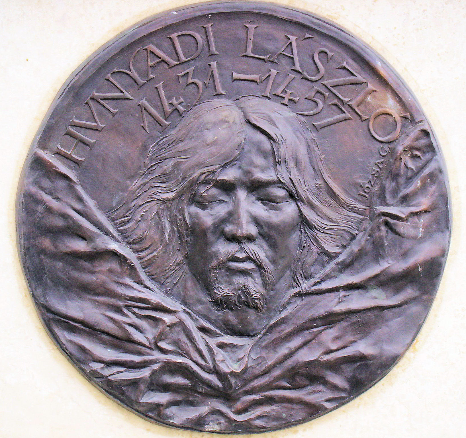 Hunyadi László. Dombormű a szegedi Hunyadi Mátyás-szobor talapzatán – photo taken by uploader User:Csanády in 2006. other version: File:JózsaGáborHunyadiLászlóKJ.jpg